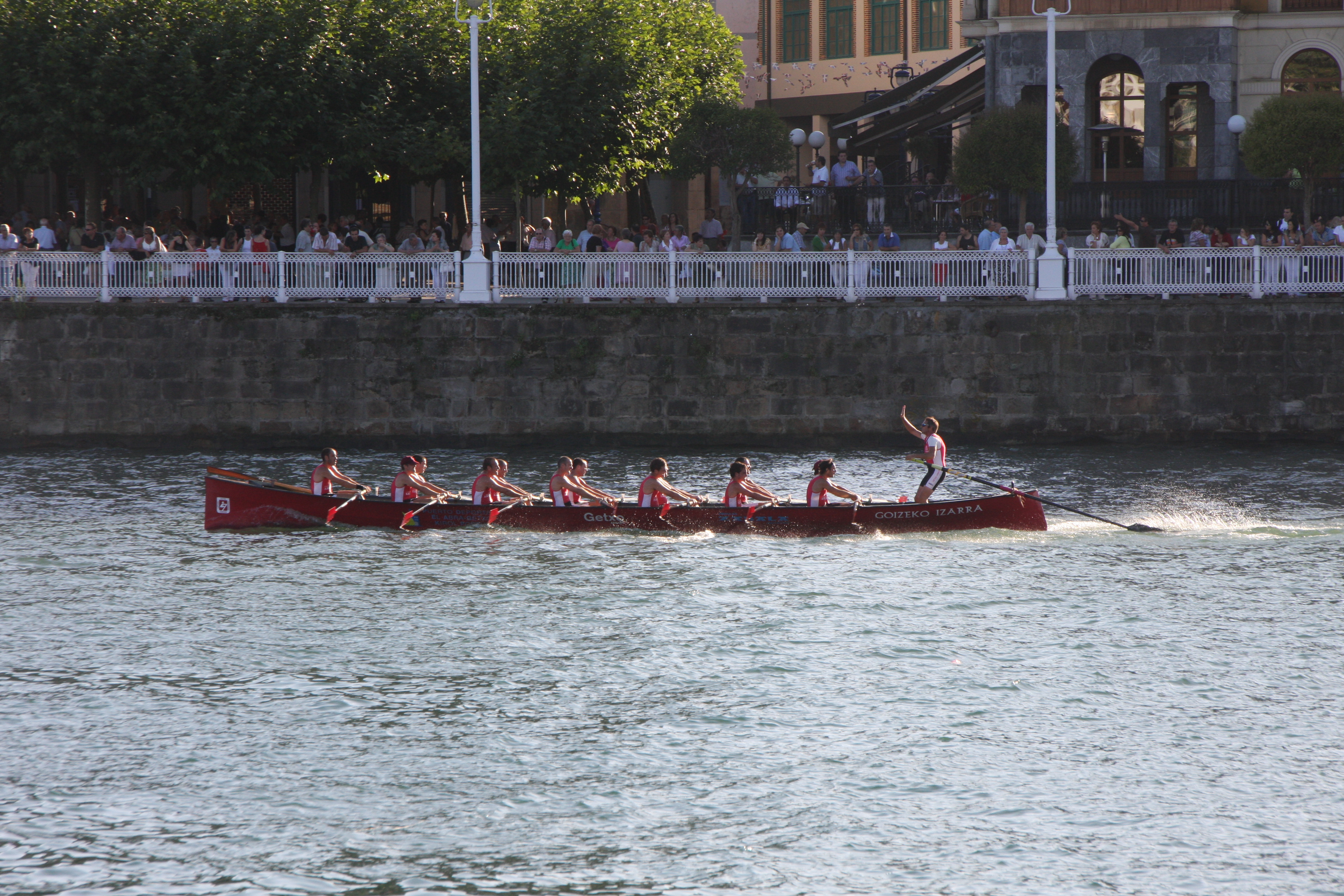 2009ko irailaren 6an Getxo Arraun Taldeak irabazi zuen Portugaleteko San Miguel-Segemar bandera, Kantauriko Arraun Elkarteen (KAE) Ligako lehenengo mailara igotzeko erlojupeko bi estropadetatik bigarrena eta azkena, alegia.